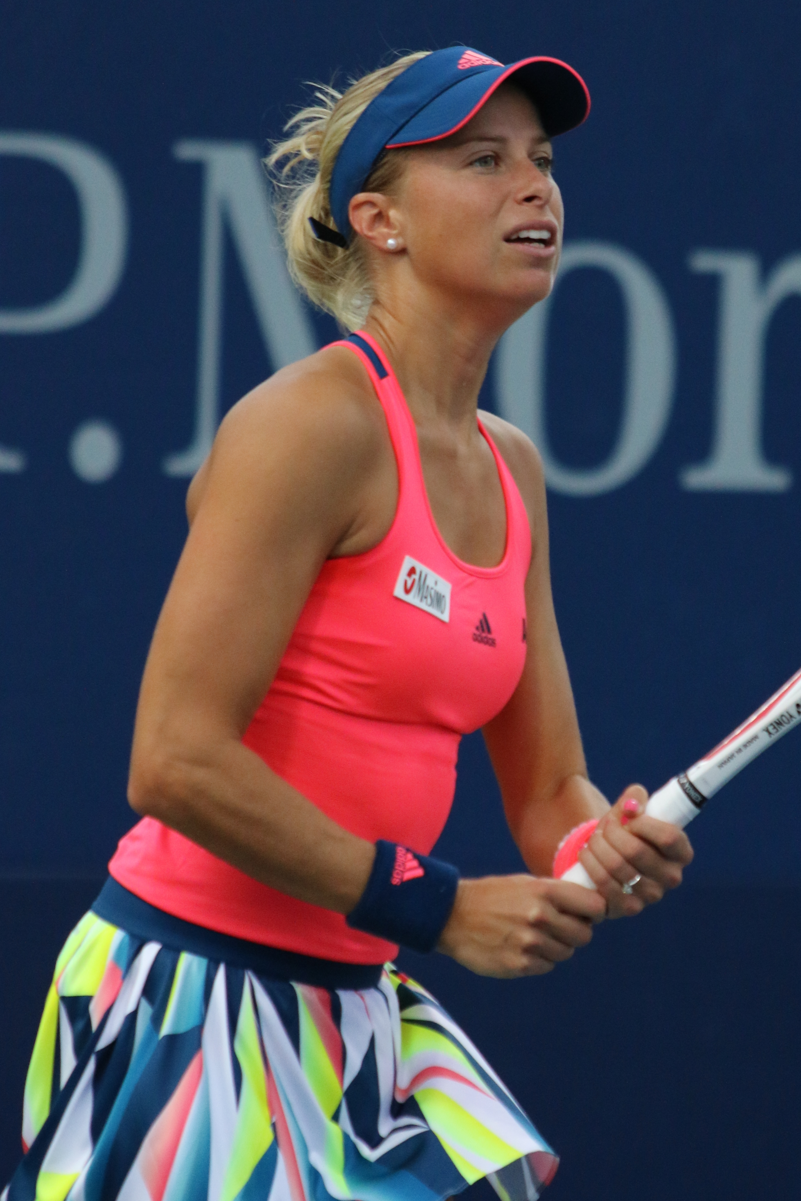 Hlavackova US16 (29)